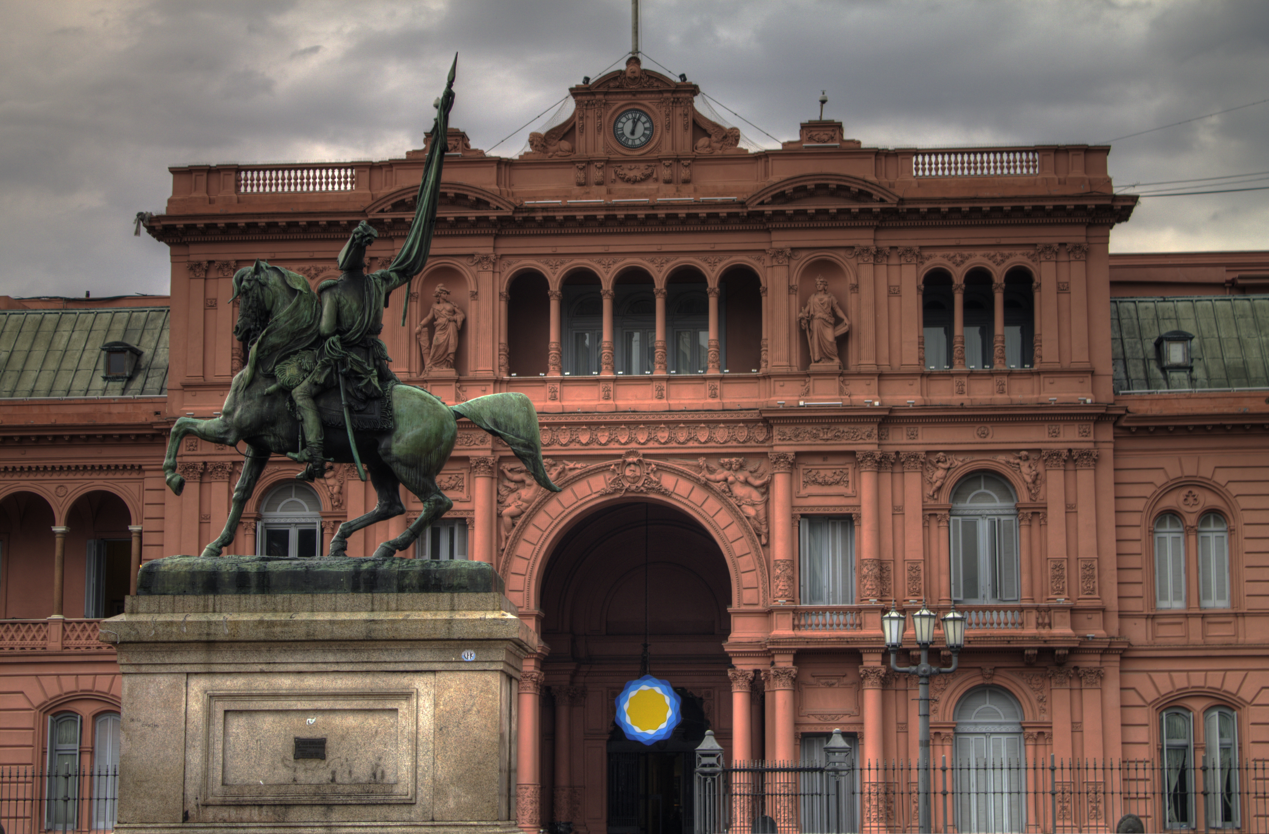 Frente de la casa de gobierno Argentina, junto a la parte trasera del monumento ecuestre al General Manuel Belgrano en plaza de mayo.